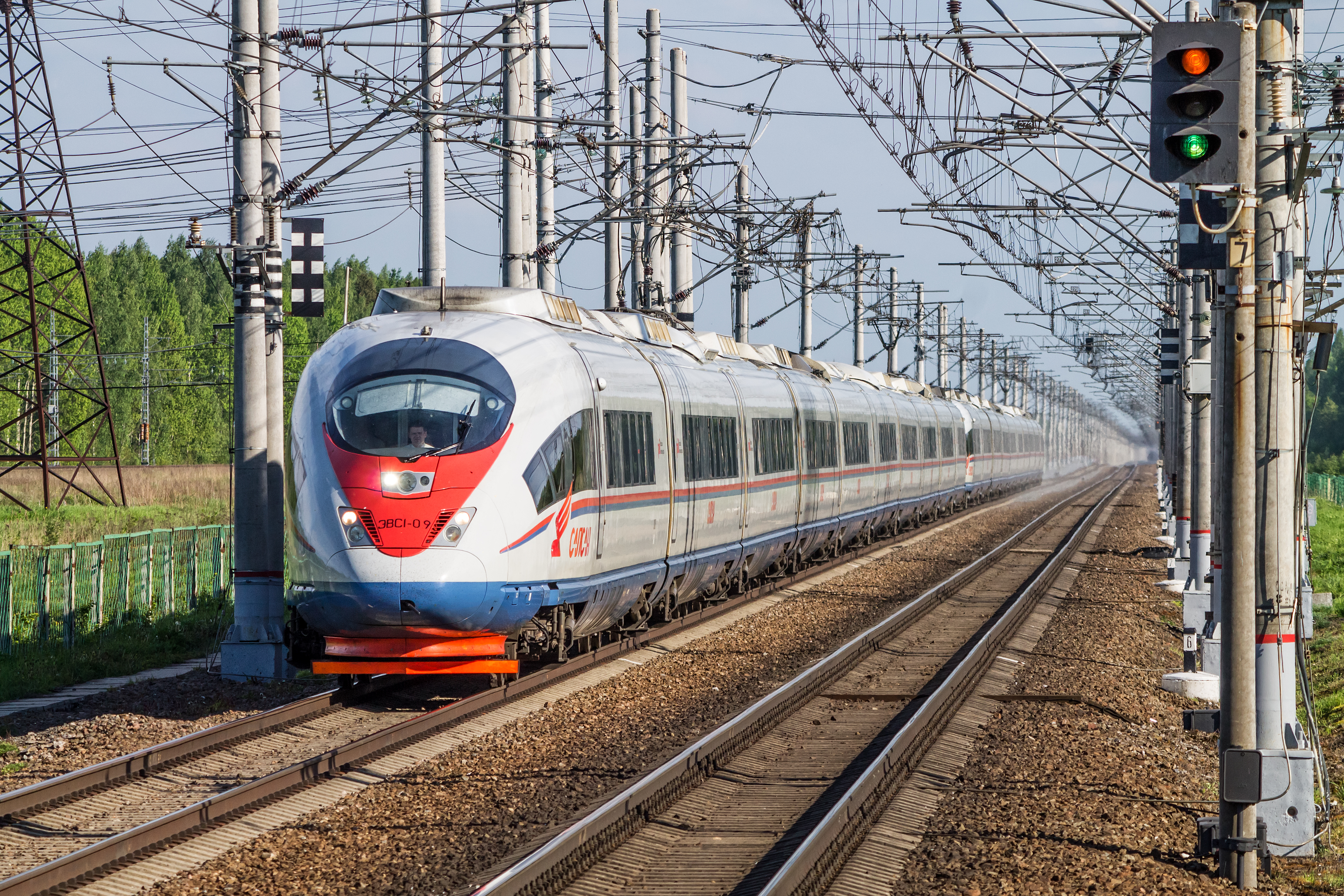 ЭВС1-09, Саблино - Колпино см. фото 694100 в альбоме автора